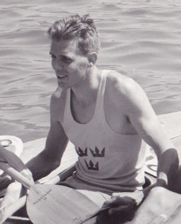 Sven-Olov Sjödelius, 1960 Olympics